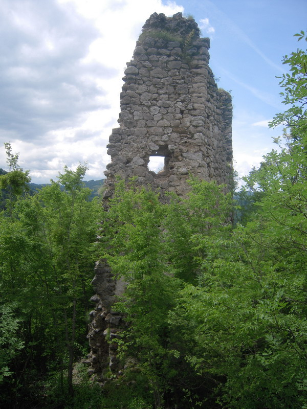 Тврђава Звечај